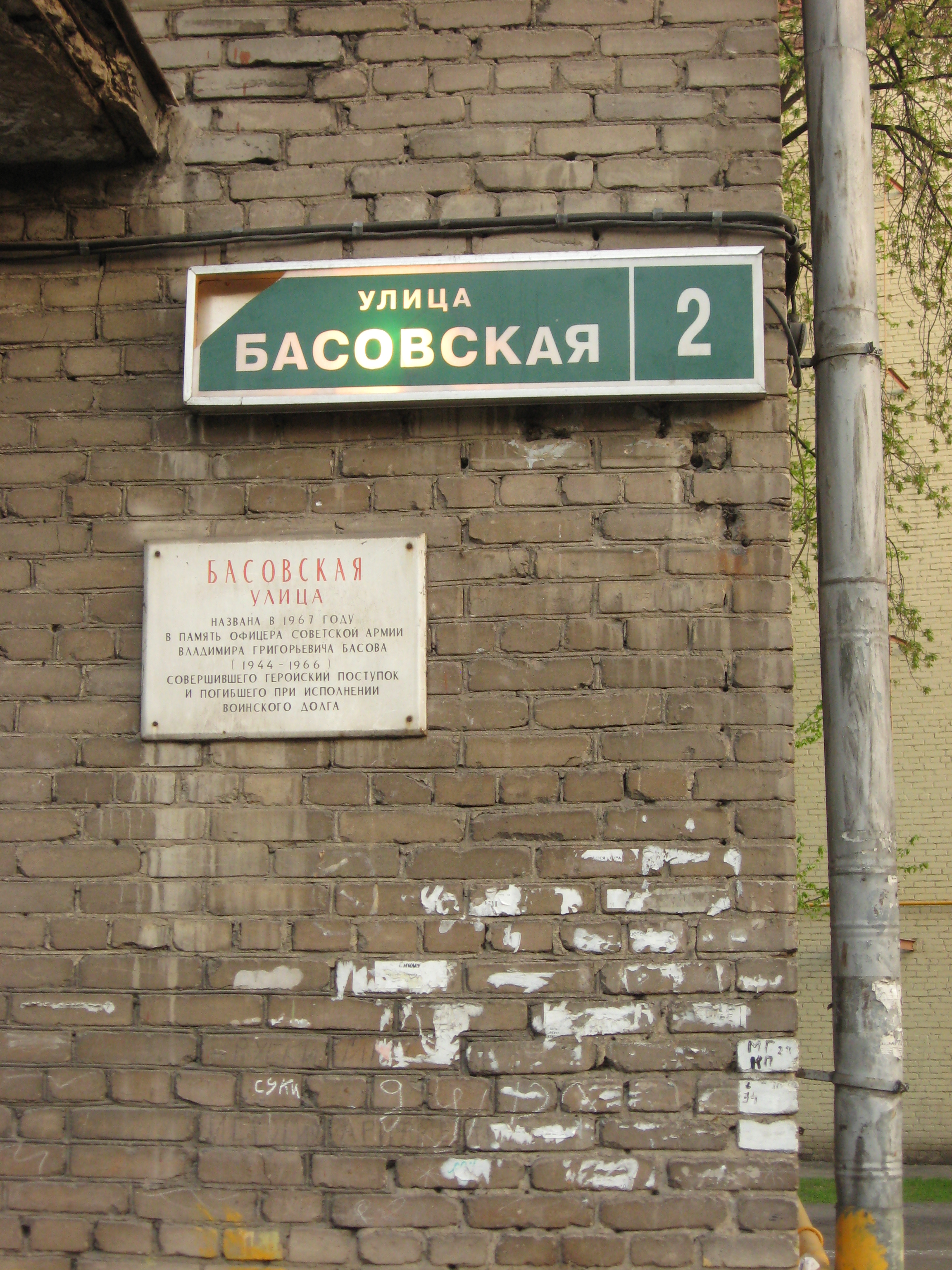 Мемориальная доска на доме2 по Басовской улице в Москве